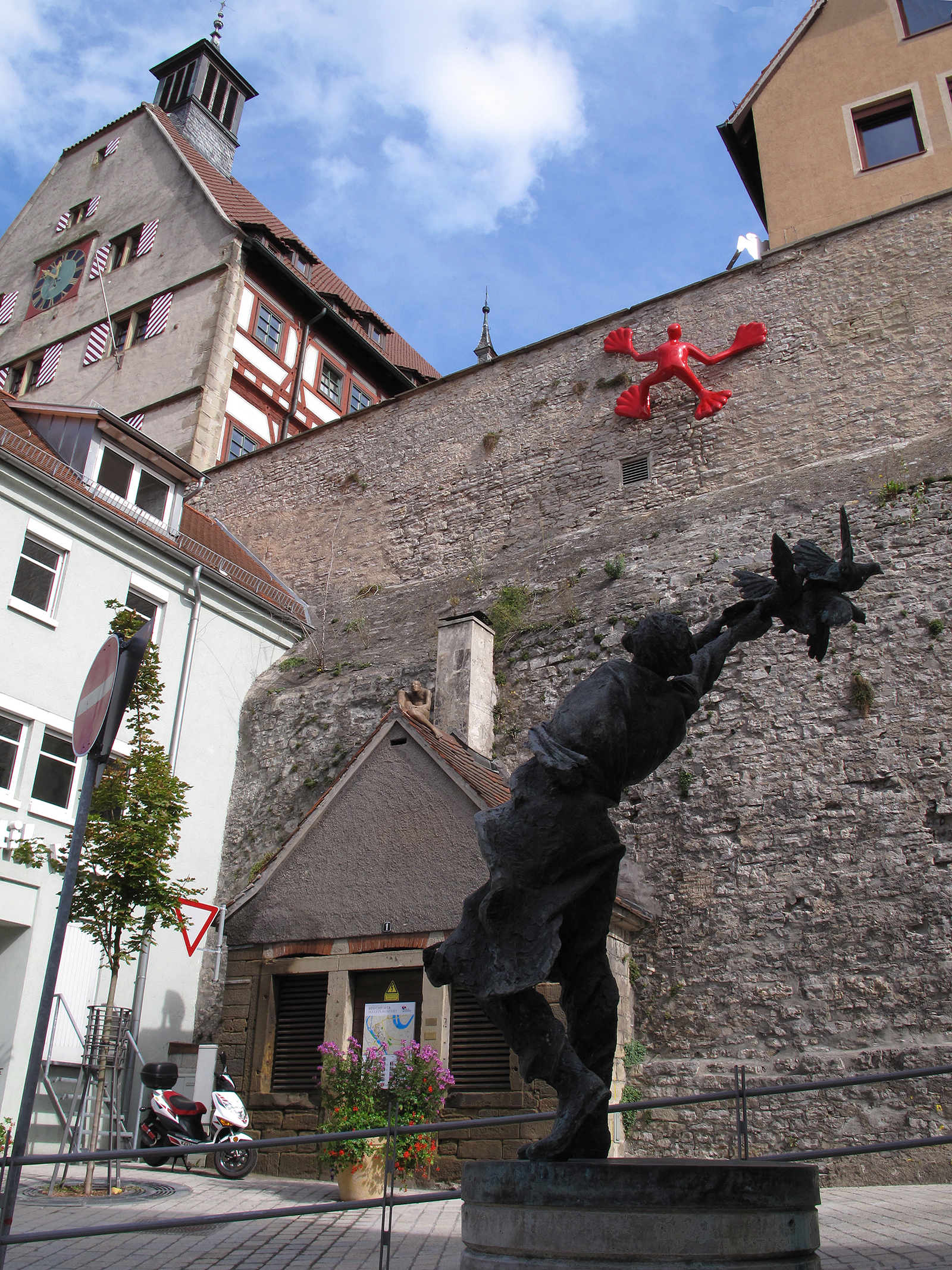 Vier Werke vor und an der Besigheimer Stadtmauer. Von oben: Margit Lehmann-Asperg, Mauerhocker, - rosalie, Flossi, - Anette Mürdter, Dachreiter, - Karl-Henning Seemann, Brieftaubenstarter